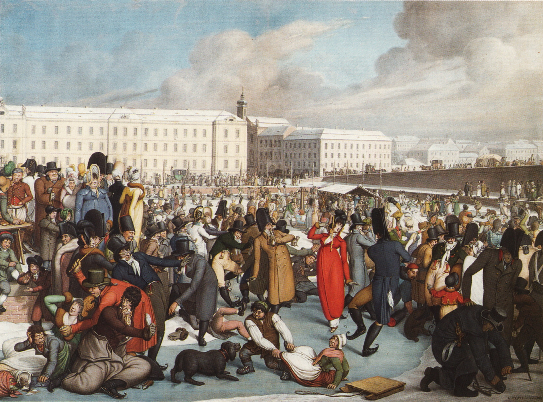 Der Eislaufplatz beim Stubentor, am zugefrorenen Hafenbecken des Wiener Neustädter Kanals. Gouache, 51,6 x 70 cm. Signiert G. E. Opiz und datiert mit 1805